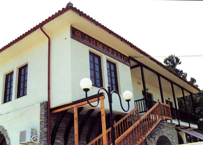 Το δημαρχείο του Δήμου Τοπείρου στην έδρα του Δήμο το Εύλαλο